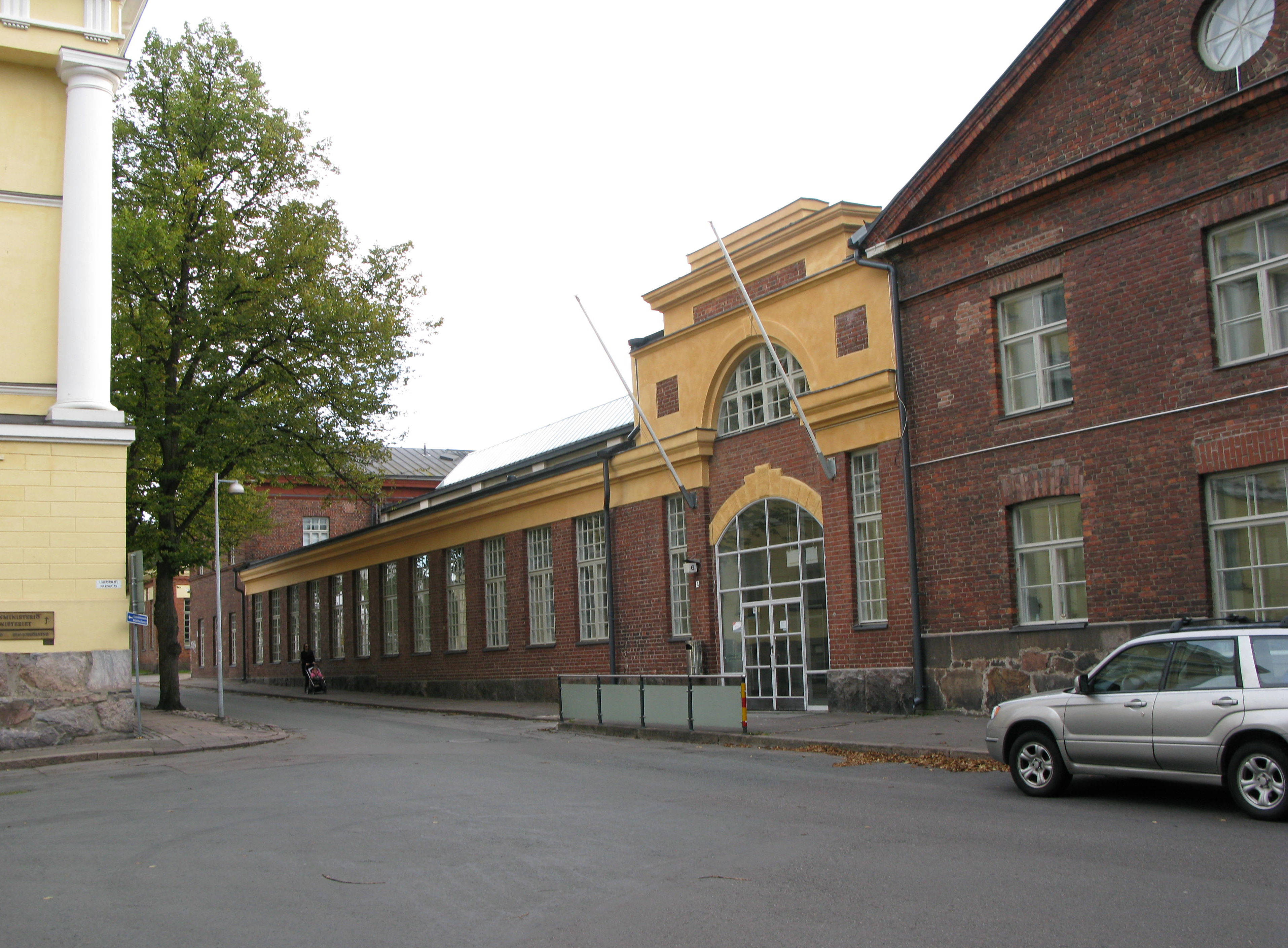 Vanhat konepaja- ja asevarikkorakennukset on saneerattu Katajanokan ala-asteen koulun käyttöön.